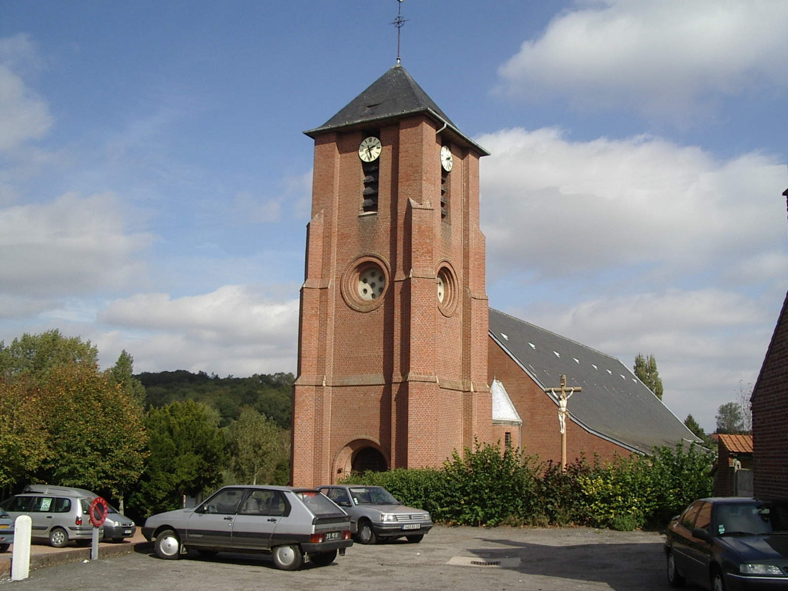 Eglise de Berthen (59, Nord)